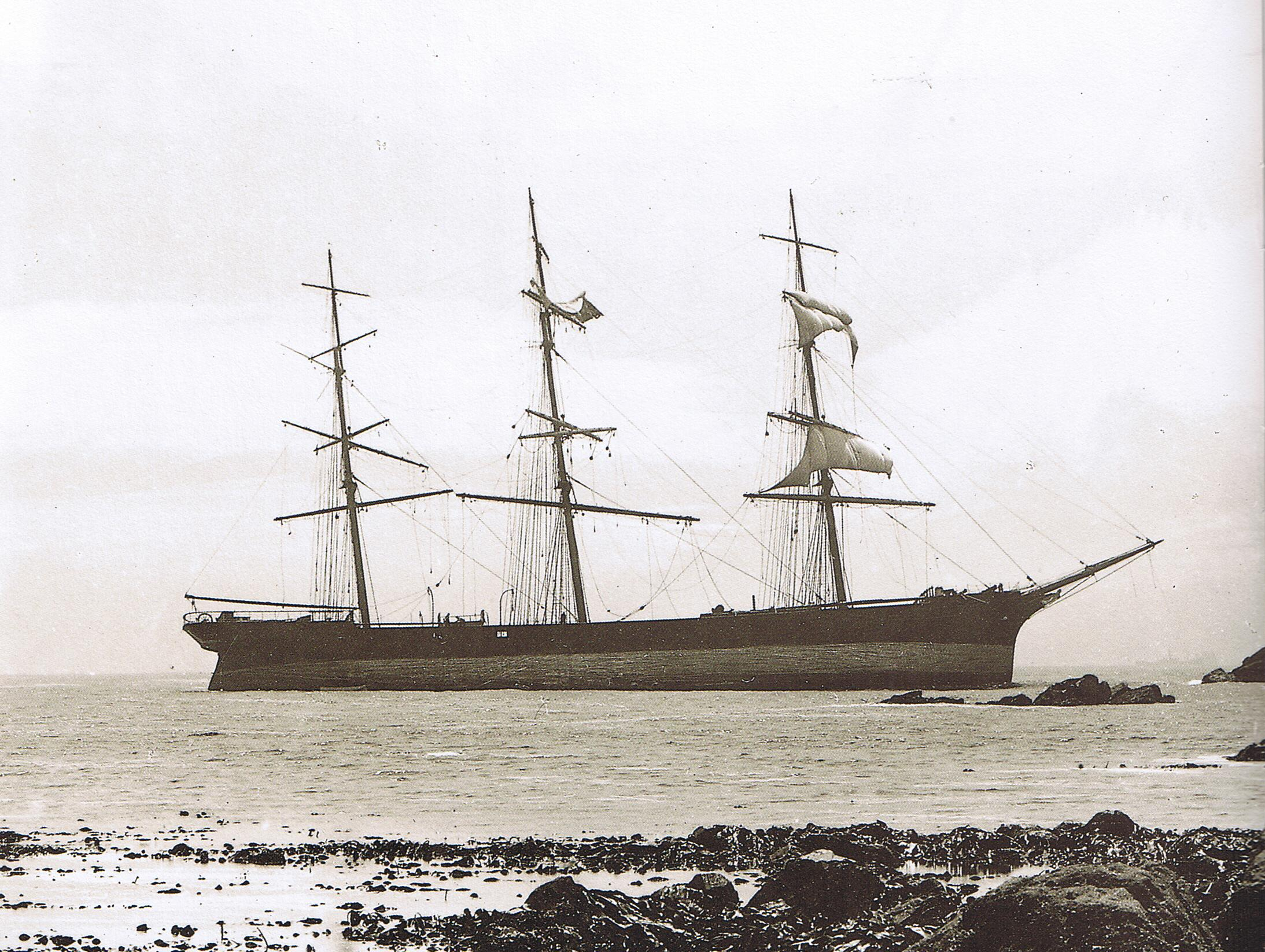 Das deutsche Vollschiff „Wandsbek“ auf Grund, unweit von Kap Lizard, im Mai 1900. Die Schleppleine war zu früh losgeworfen worden.